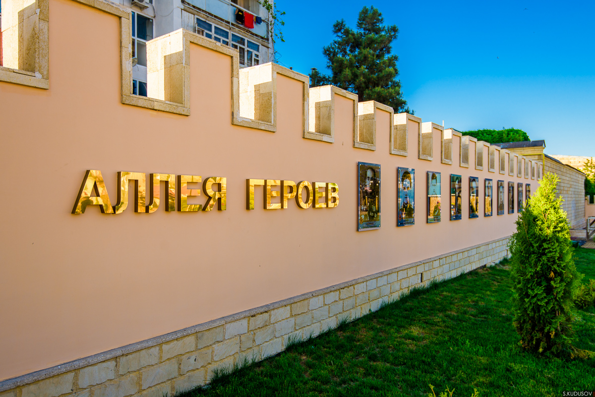 Аллея героев в Дербенте